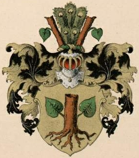 Taube suguvõsa aadli- ja parunivapp